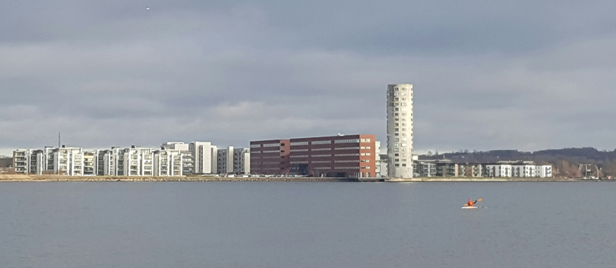 Lindholm brygge, et bolig- og erhvervsområde i Nørresundby, som før var domineret af en cementfabrik.